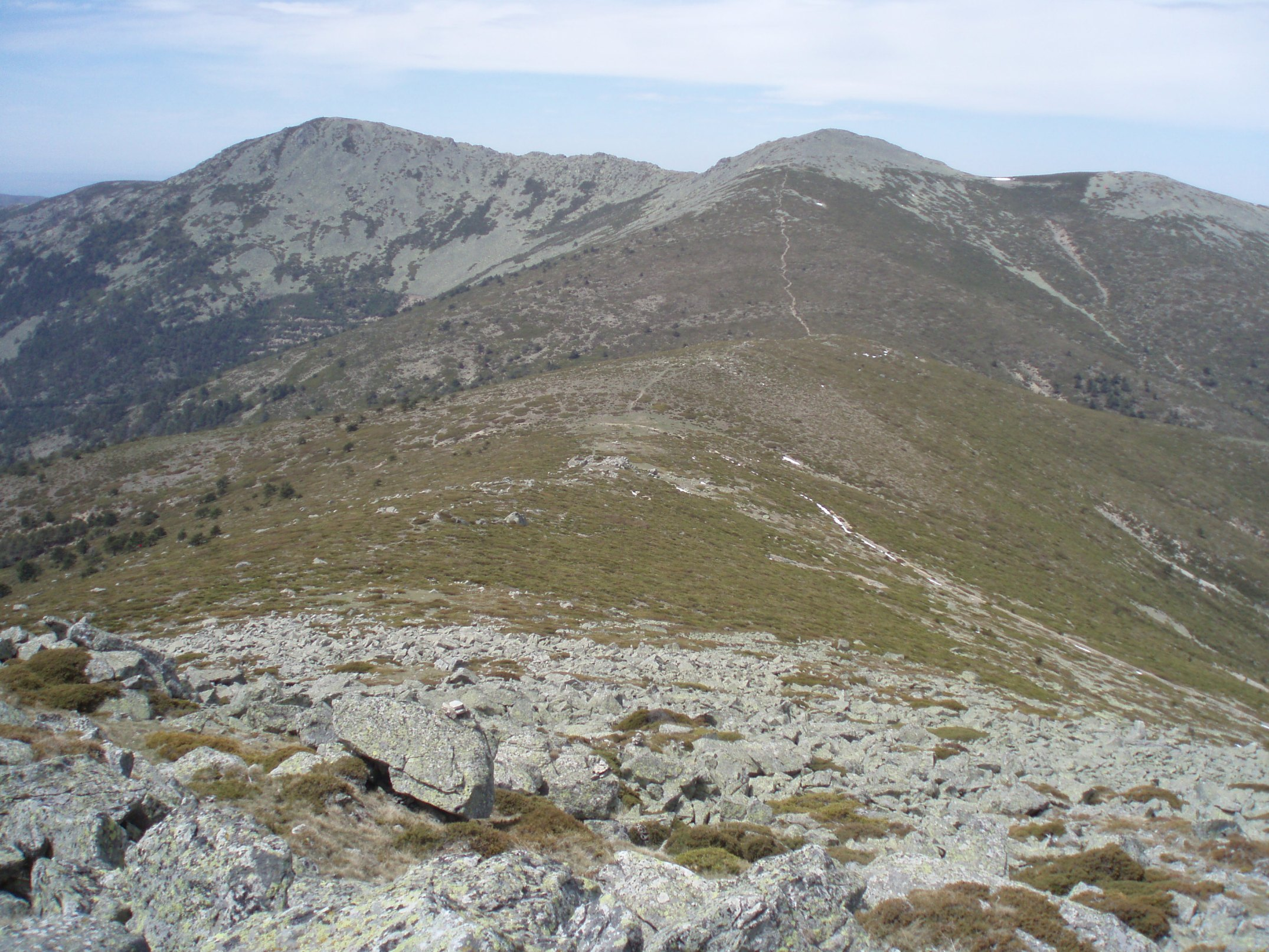 La Mujer Muerta desde la cima de Montón de Trigo (Sierra de Guadarrama, España).